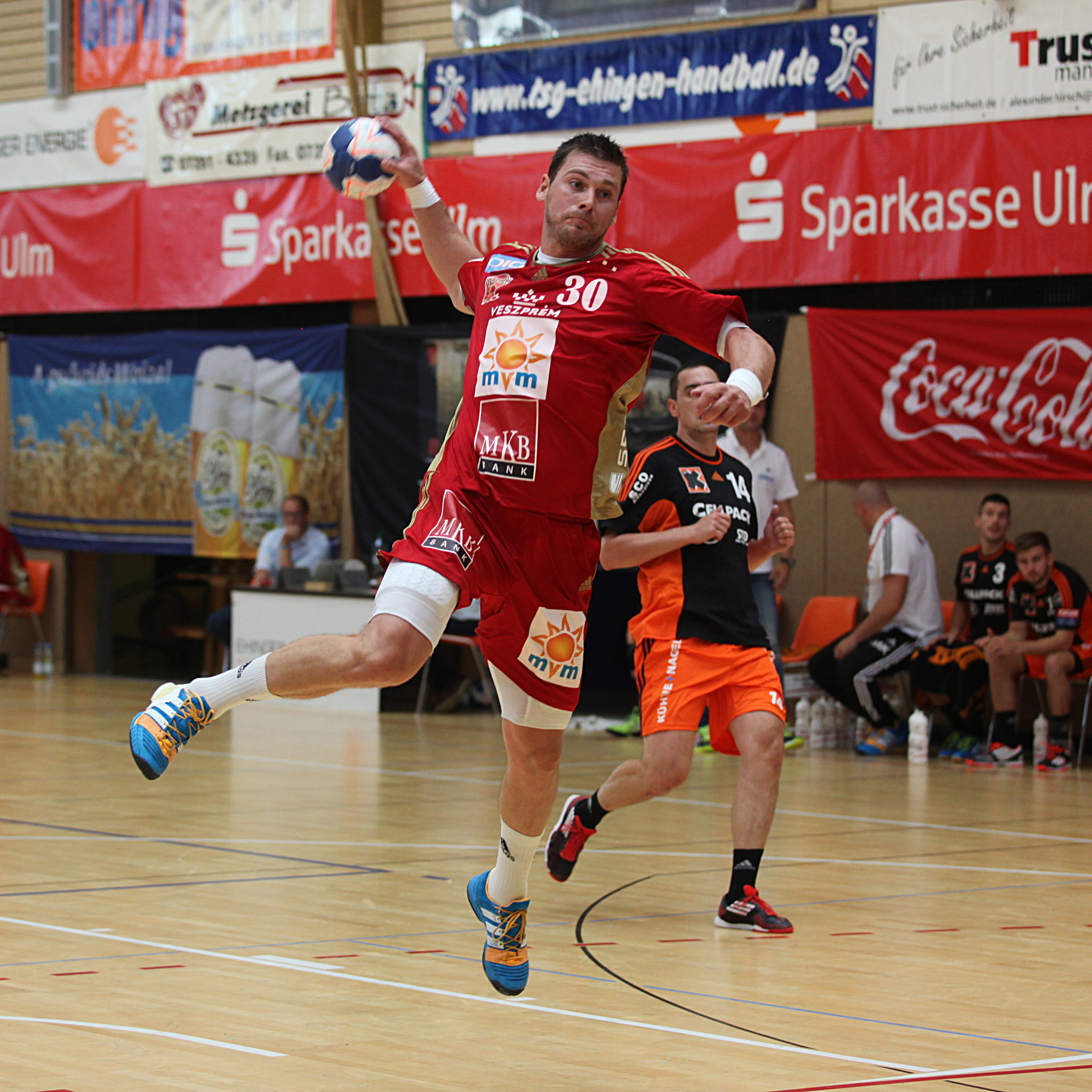 Mirsad Terzić, Handballspieler von KC Veszprém am 16. August 2014 beim Sparkassen-Cup in Ehingen.